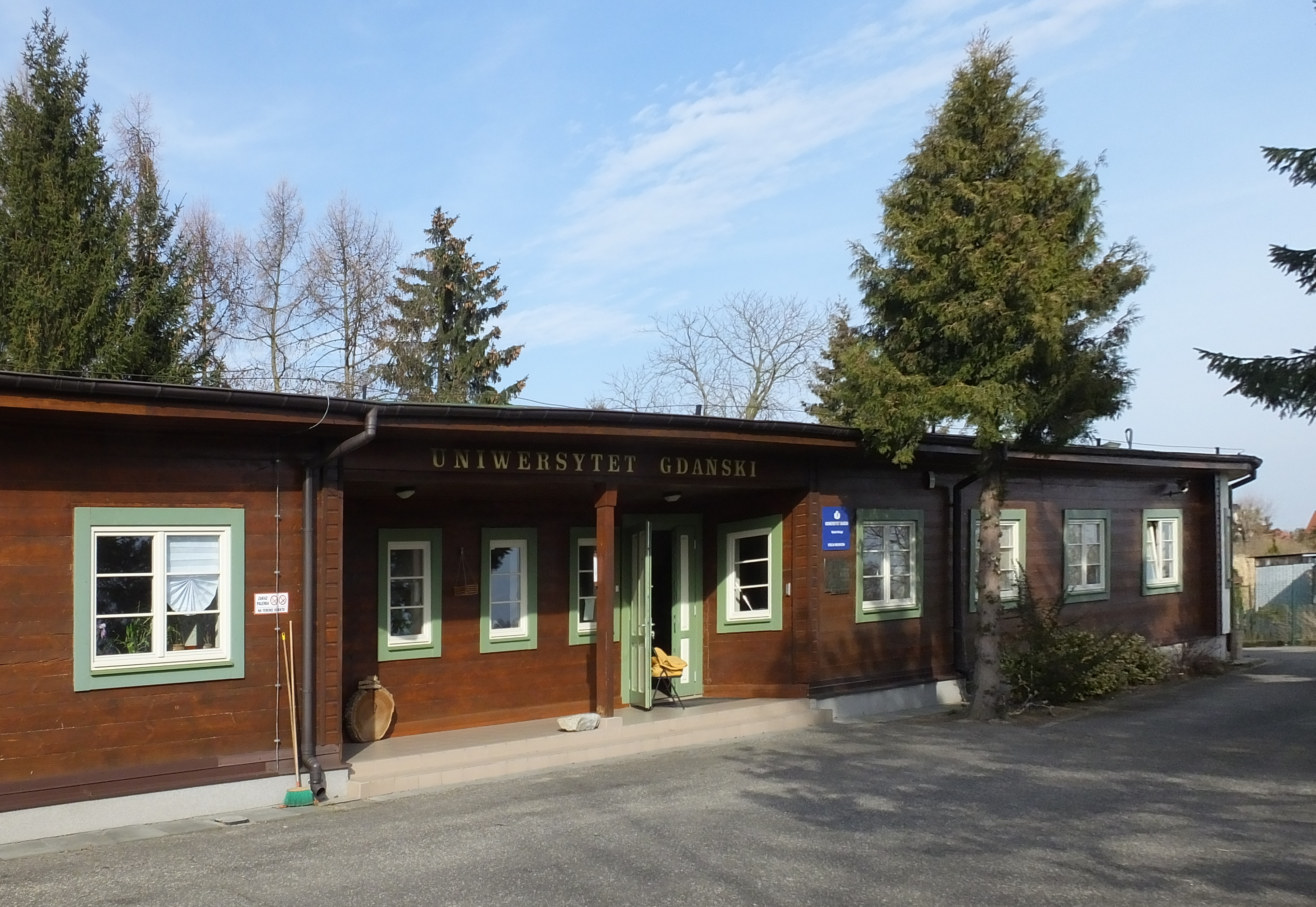 Stacja Biologiczna Uniwersytetu Gdańskiego, ul. Ornitologów 26, Gdańsk. Budynek naukowo-dydaktyczny